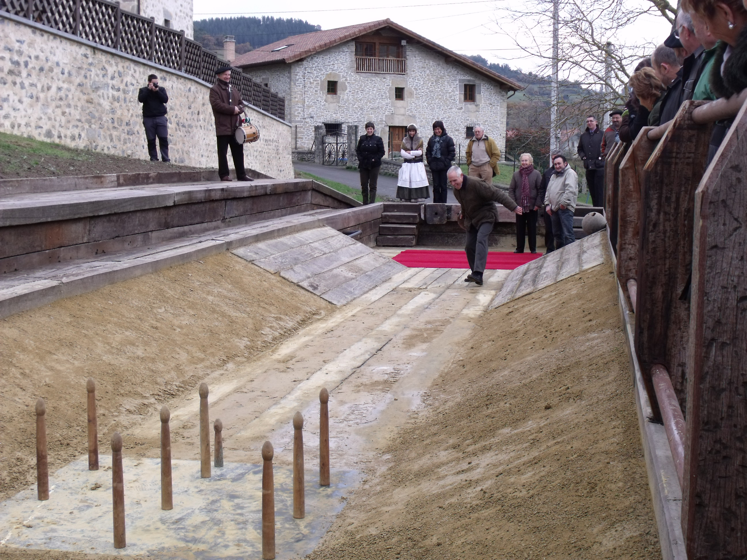 Lendoñobeitikoko (Urduña, Bizkaia) bolatokiaren inaugurazioa.